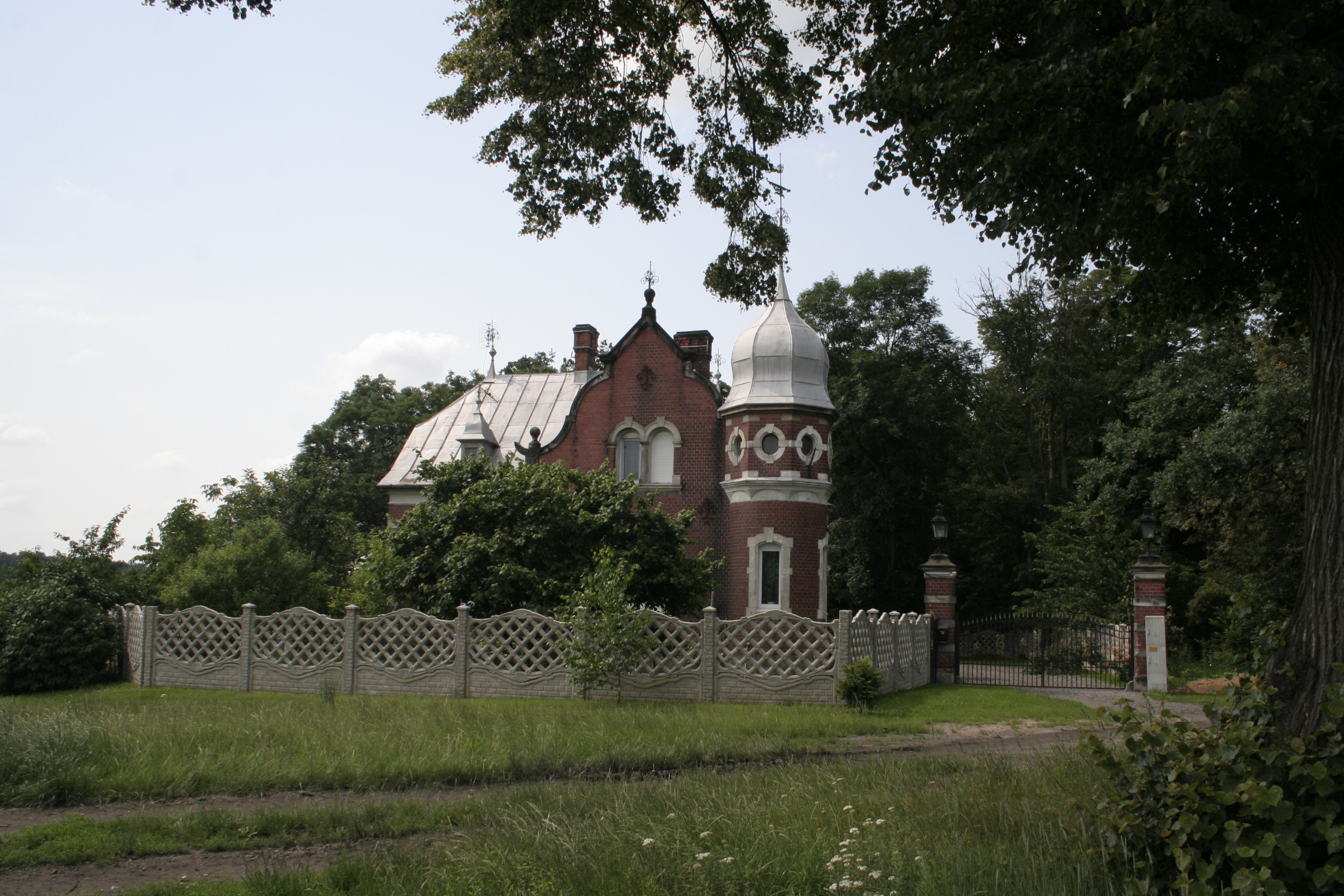 Zespół pałacowo-parkowy w Kwietnie_rządcówka. Widok od strony drogi gruntowej łączącej rządcówkę z drogą wojewódzką 345